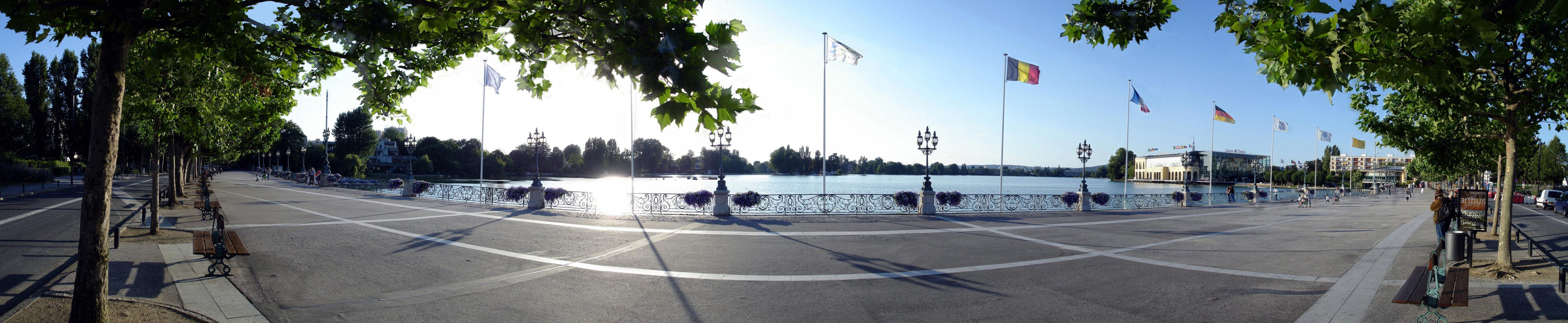 Panoramique de l'esplanade Patenôtre-Desnoyers à Enghien-les-Bains, Val-d'Oise, France.